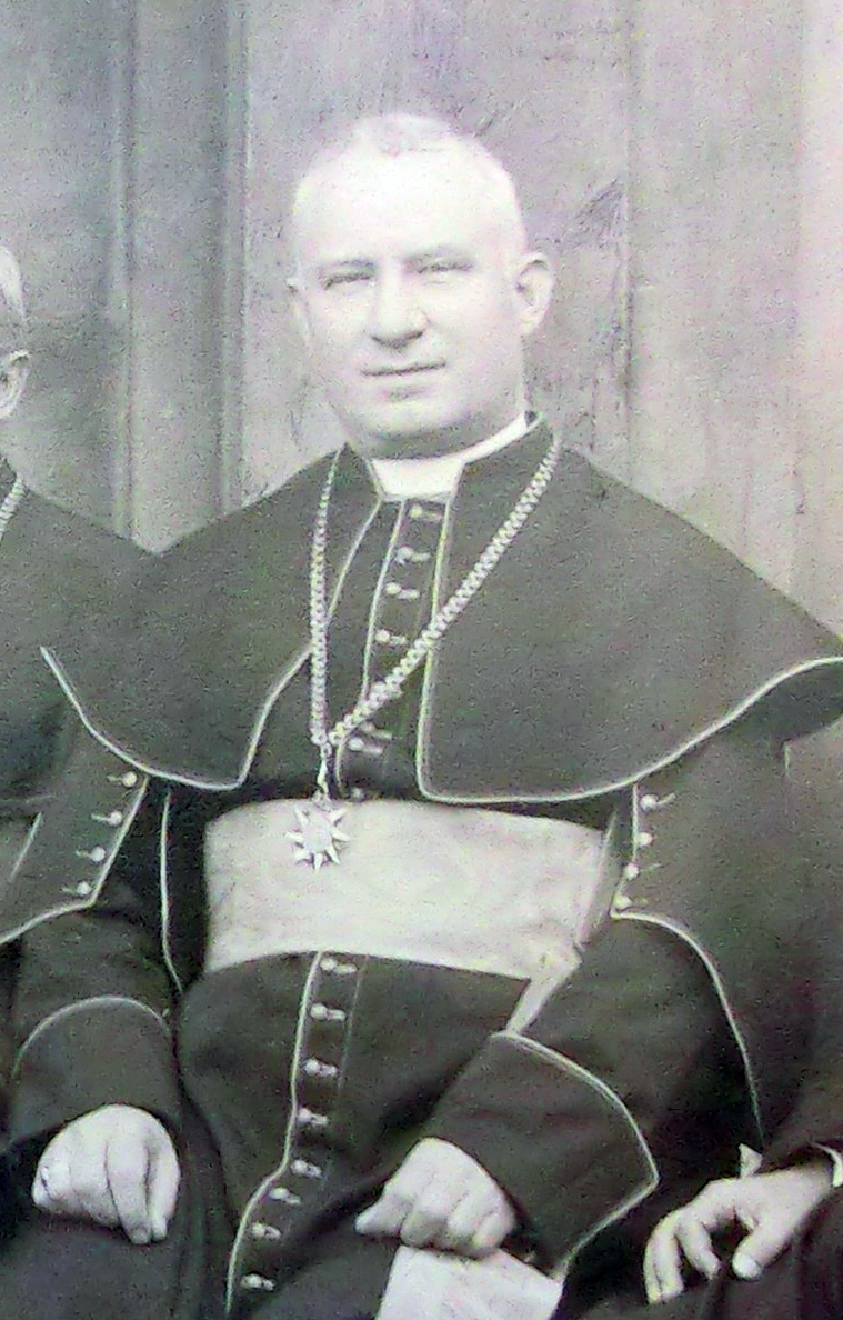 Kanovník a pozdější 1. litoměřický světící biskup Antonín Čech (cca 1904)